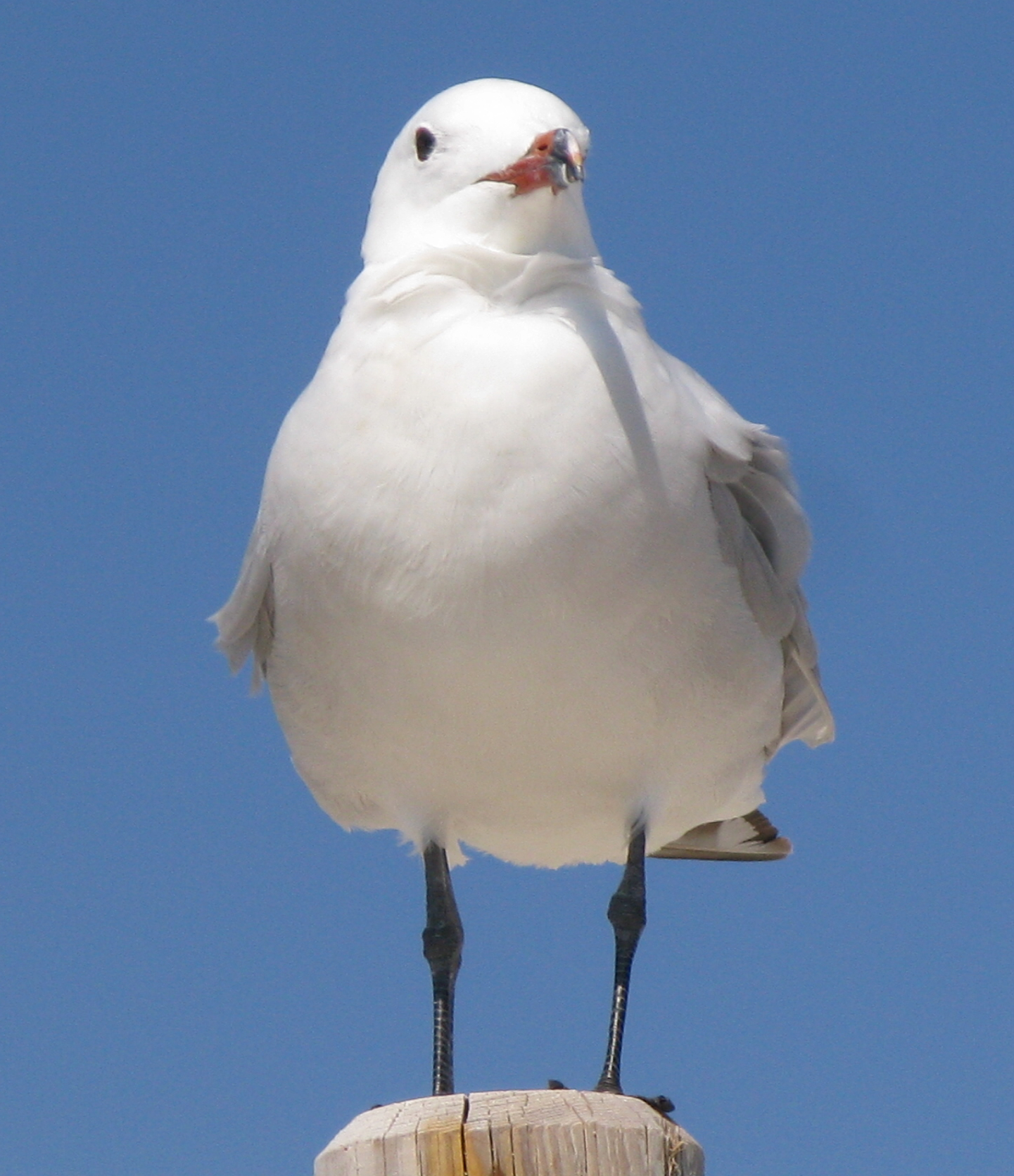 Goéland d'Audouin (ichthyaetus audouinii), platja des Trenc, Campos, Majorque.